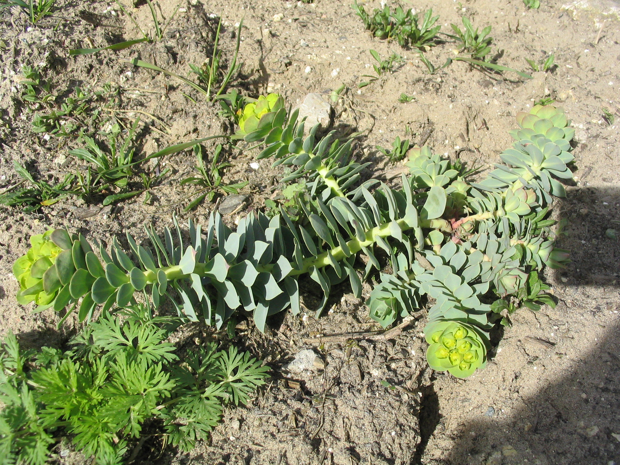 Walzenwolfsmilch, Euphorbia myrsinites, fotografiert am 09.04.2006, Fotograph: Dr. Hagen Graebner